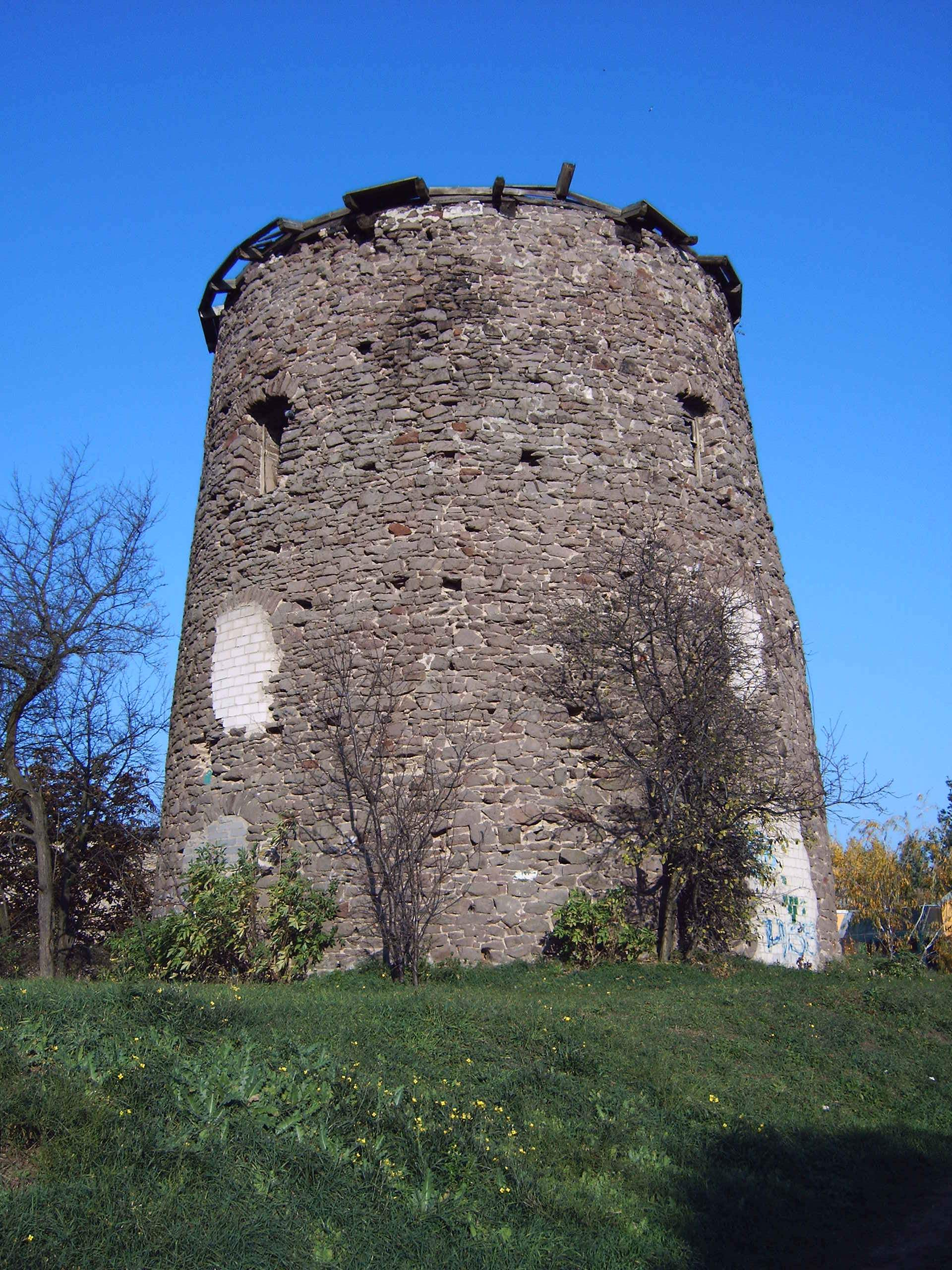 Düppler Mühle in Magdeburg, Bildaufgenommen am 31.10.2005 von Olaf2